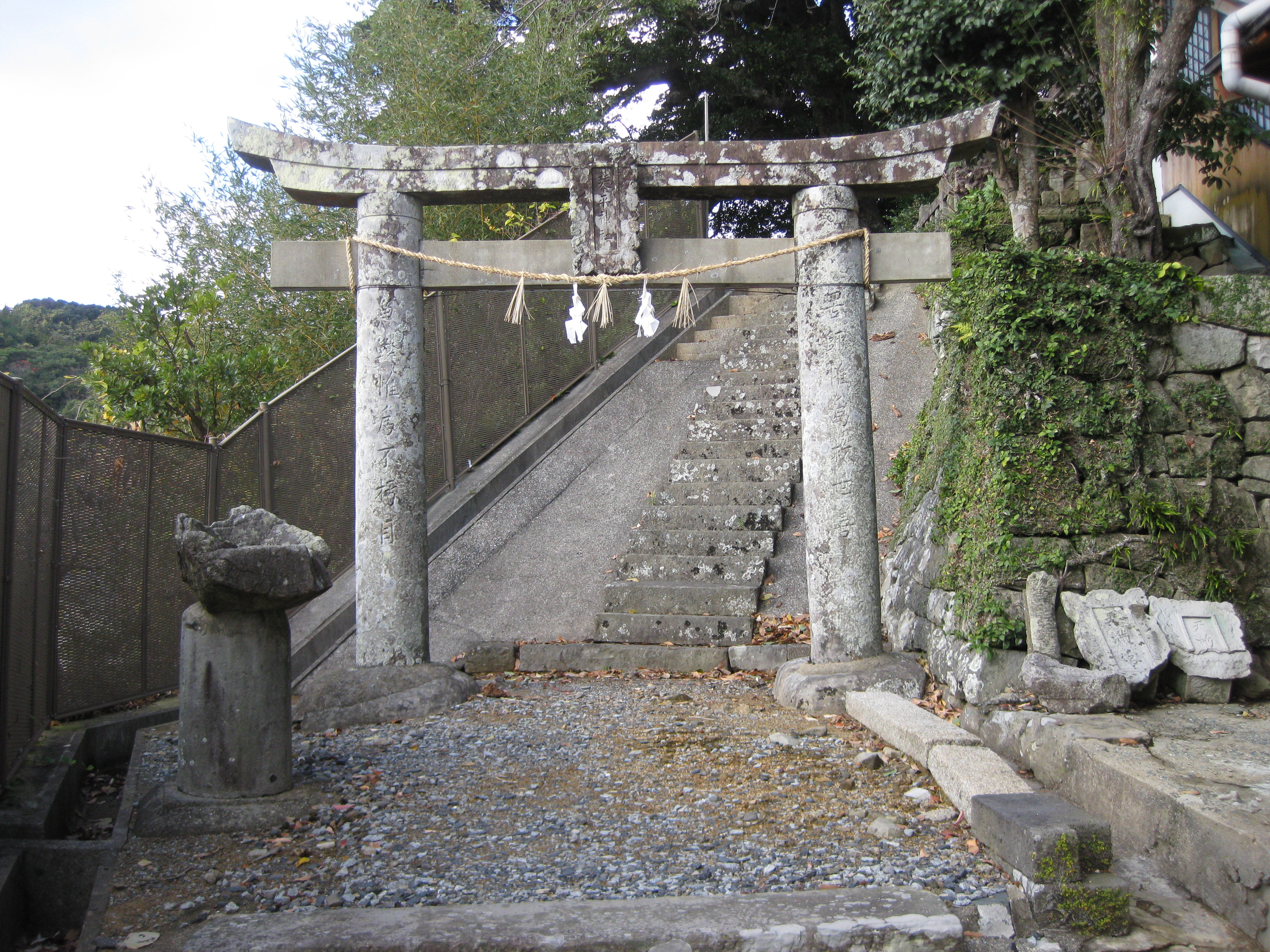 新上五島町 榎津神社